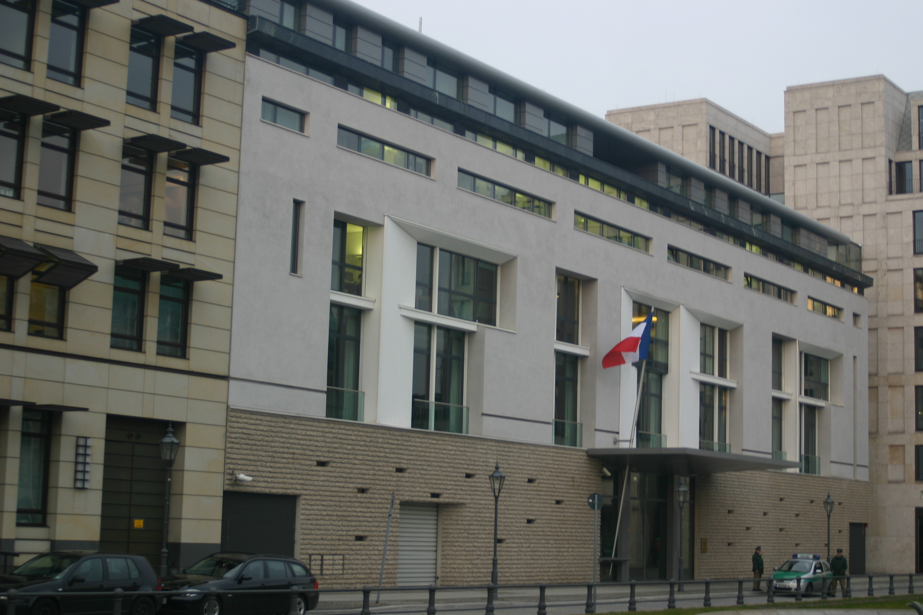 Französische Botschaft in Berlin/ French Embassy in Berlin